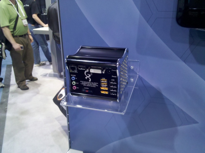 Xi3 Modular Computer